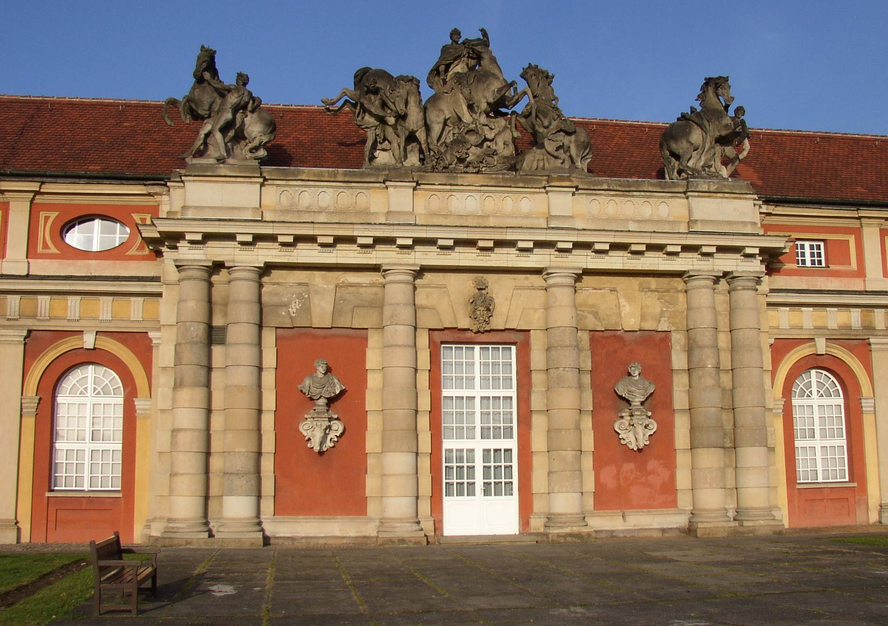 Pferdegruppen von Friedrich Christian Glume am Marstall in Potsdam, Deutschland